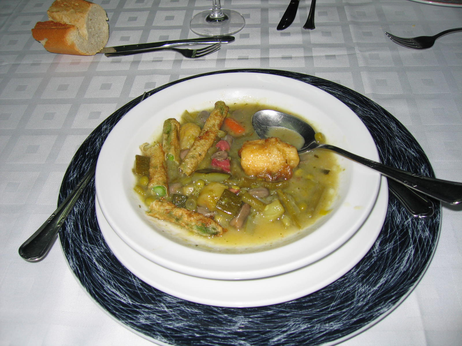 Menestra de verduras tal y como se cocina para la Feria de la Ascensión en Oviedo. Sociedad Gastronómica El Rinconín (Oviedo-España)